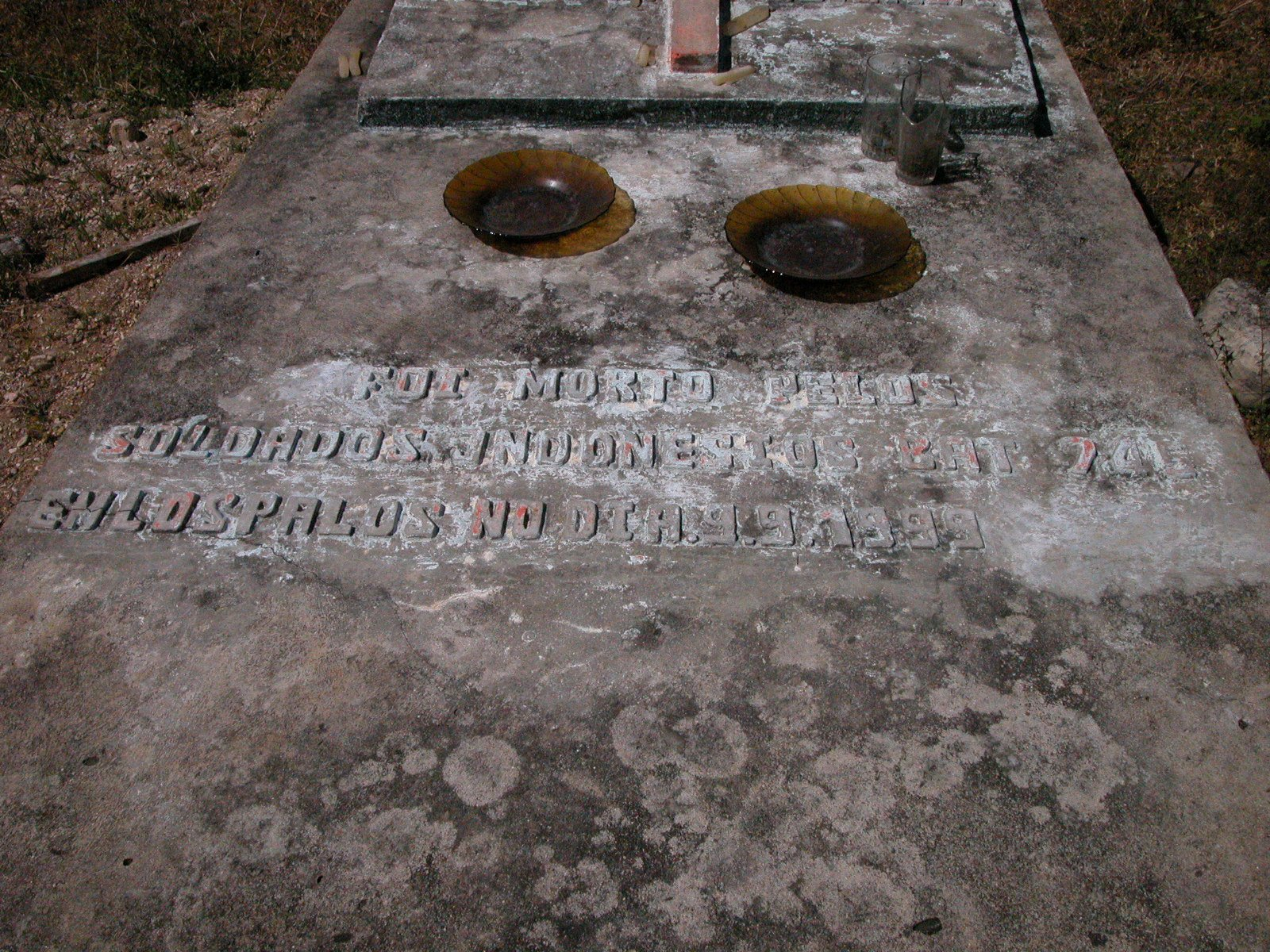 Mahnmal an der Straße zwischen Com und Lospalos. Inschrift: "Für die von den indonesischen Soldaten des Bataillon 745 am 9.9.1999 in Lospalos Ermordeten"